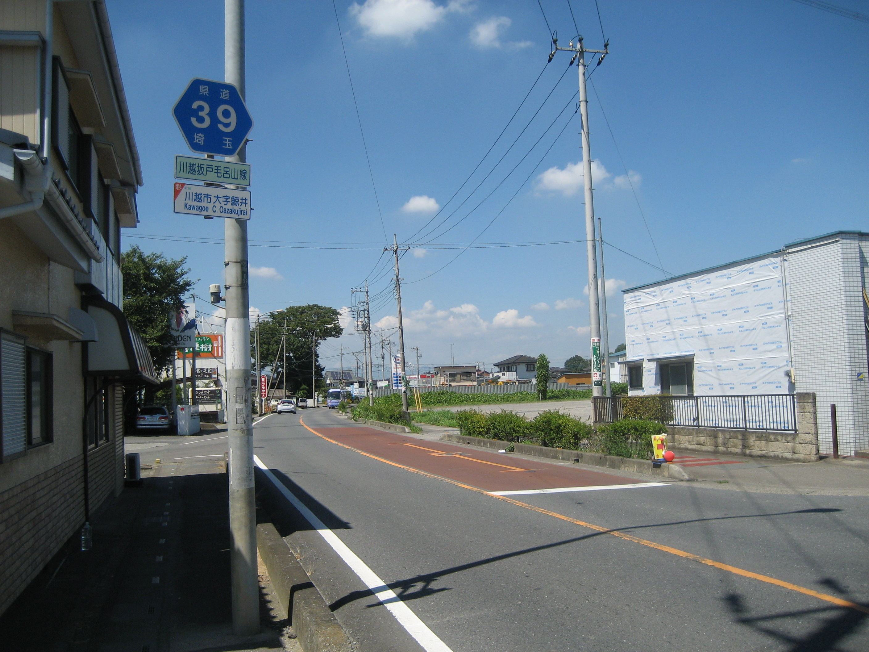 埼玉県道39号線川越市鯨井付近